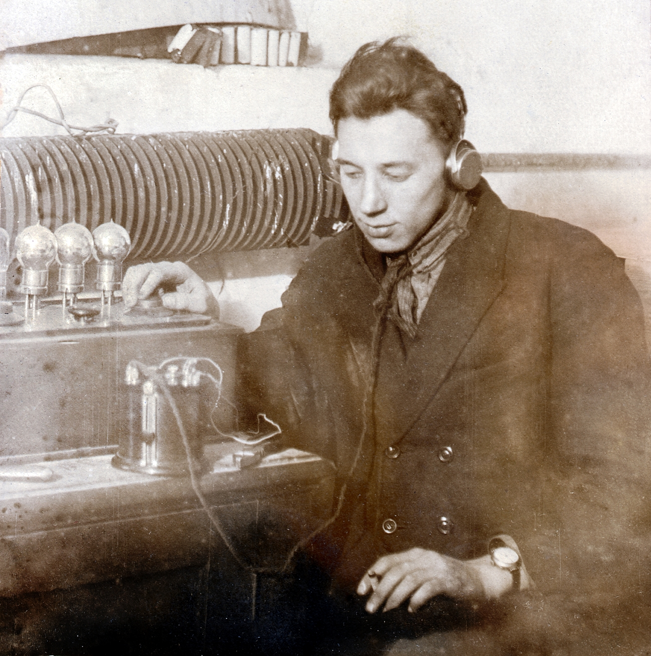 Н. И. Маркин - радиотехник, начало 1930-х годов